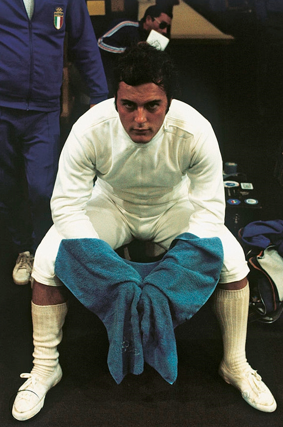 Mario Aldo Montano, 1972 Olympics